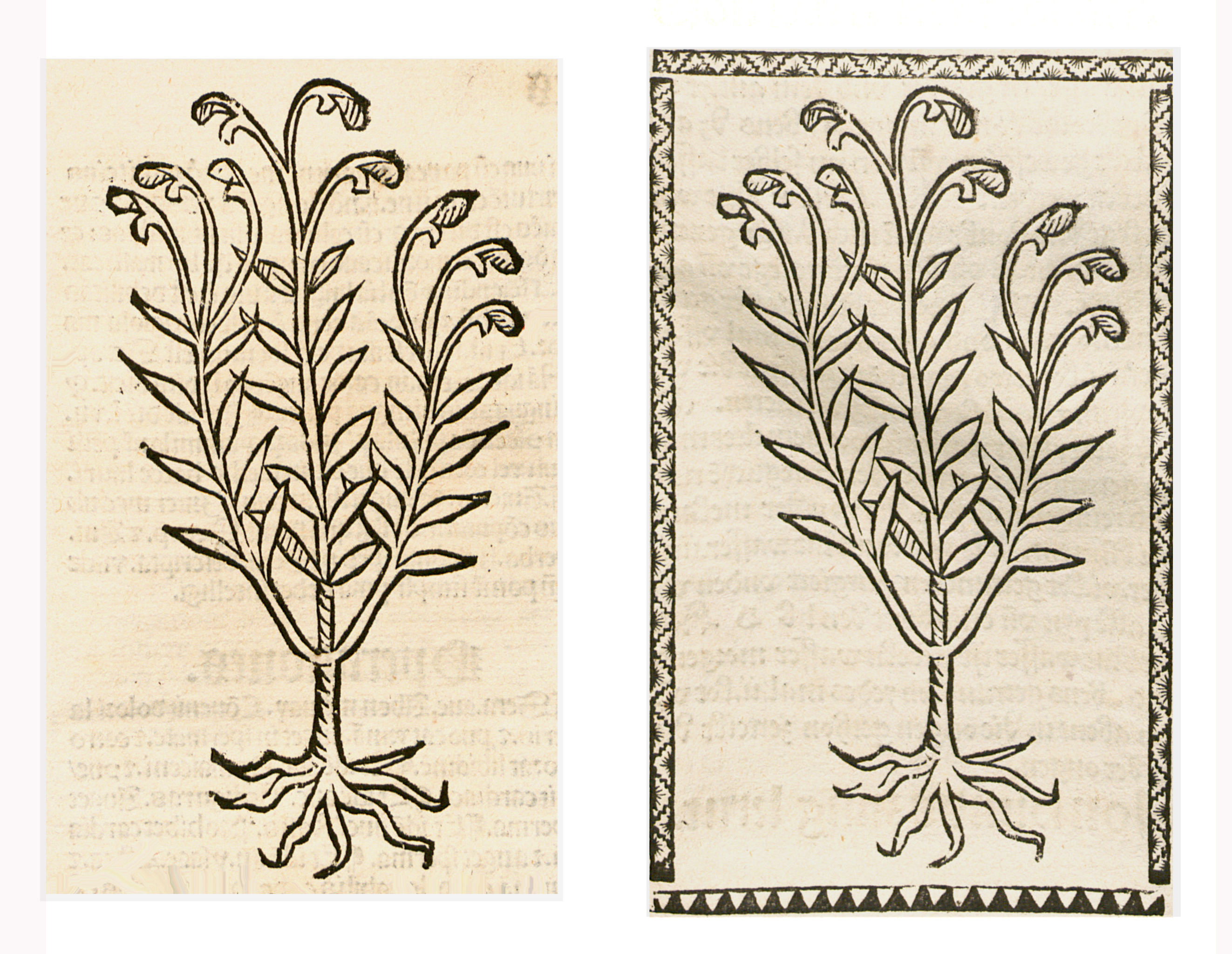 Abbildung von: Harn krut (Linaria vulgaris)